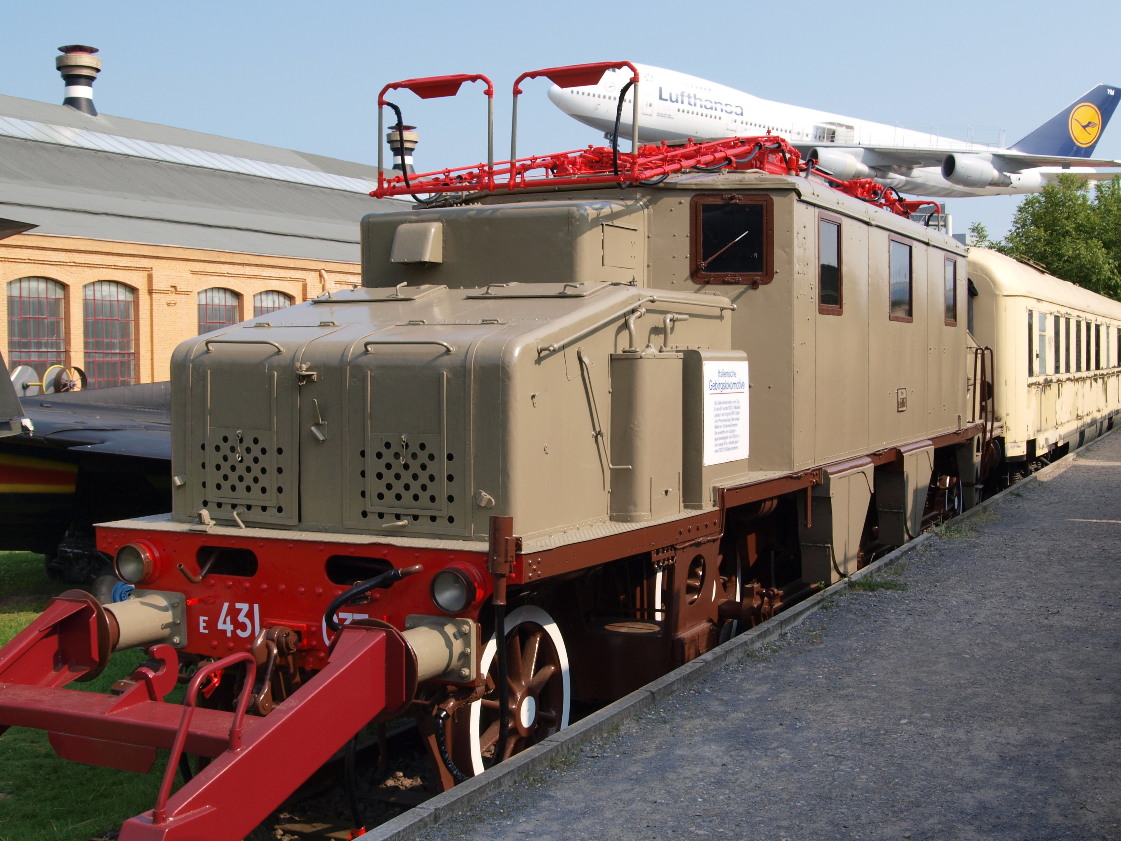 Krokodil the Technik Museum Speyer